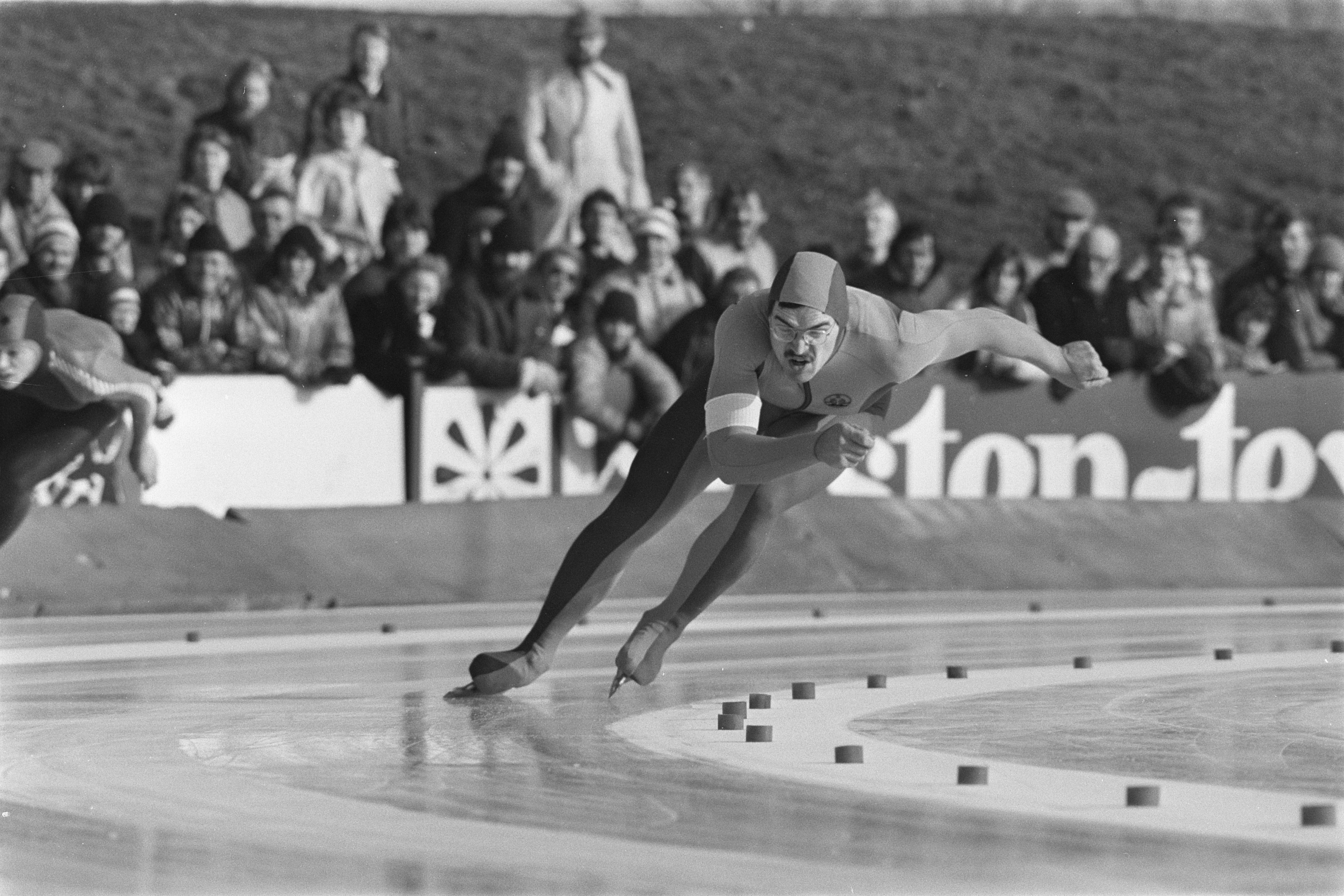 Collectie / Archief : Fotocollectie Anefo Reportage / Serie : [ onbekend ] Beschrijving : WK Sprint schaatsen in Alkmaar. Steffen Doering (Oost-Duitsland) in actie Datum : 6 februari 1982 Locatie : Alkmaar, Duitsland Trefwoorden : schaatsen Persoonsnaam : Doering, Steffen Fotograaf : Bogaerts, Rob / Anefo Auteursrechthebbende : Nationaal Archief Materiaalsoort : Negatief (zwart/wit) Nummer archiefinventaris : bekijk toegang 2.24.01.05 Bestanddeelnummer : 931-9575